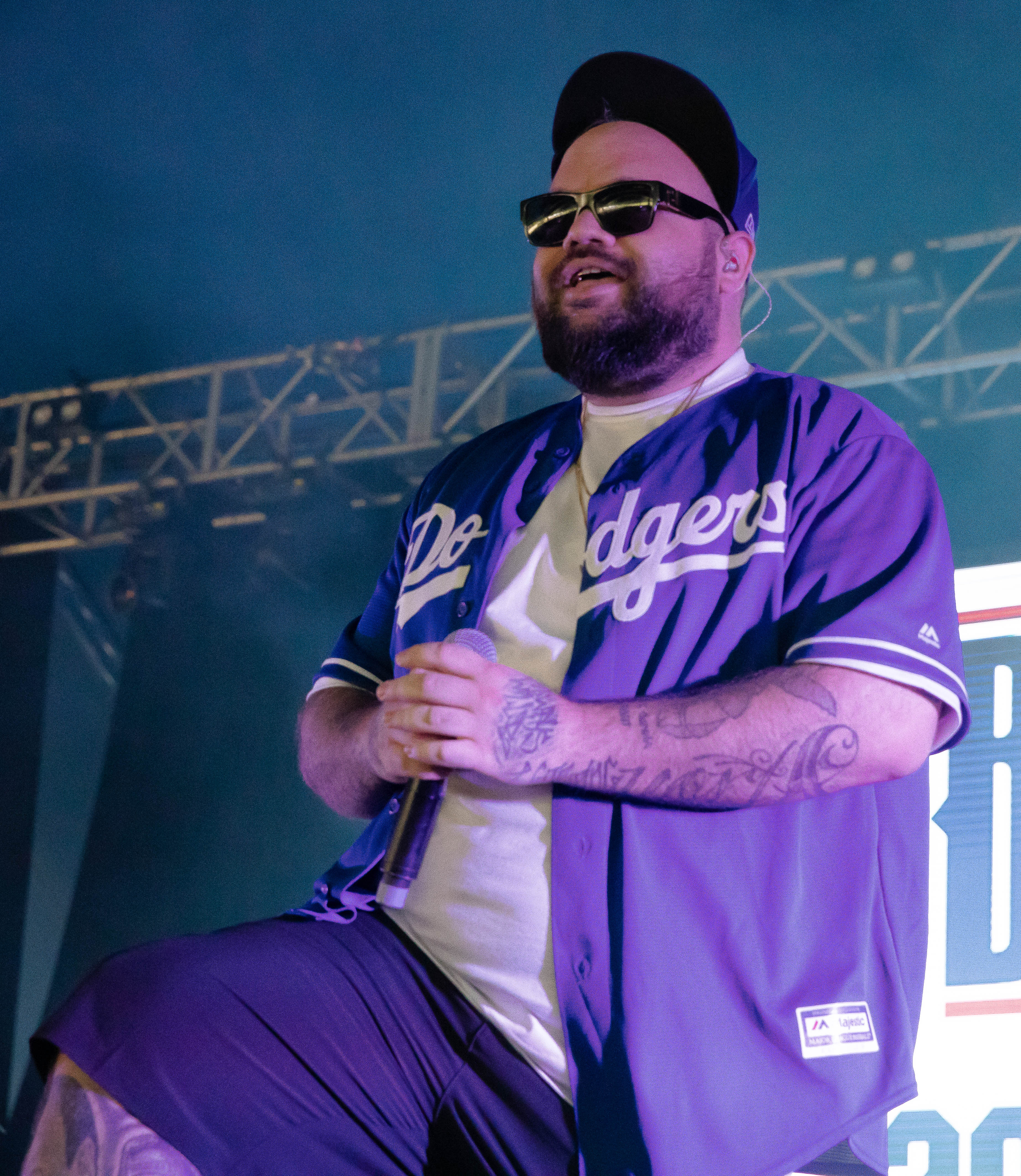 Briggs